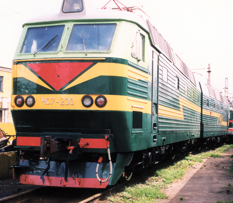 Электровоз ЧС7-233 в депо Москва-Курская